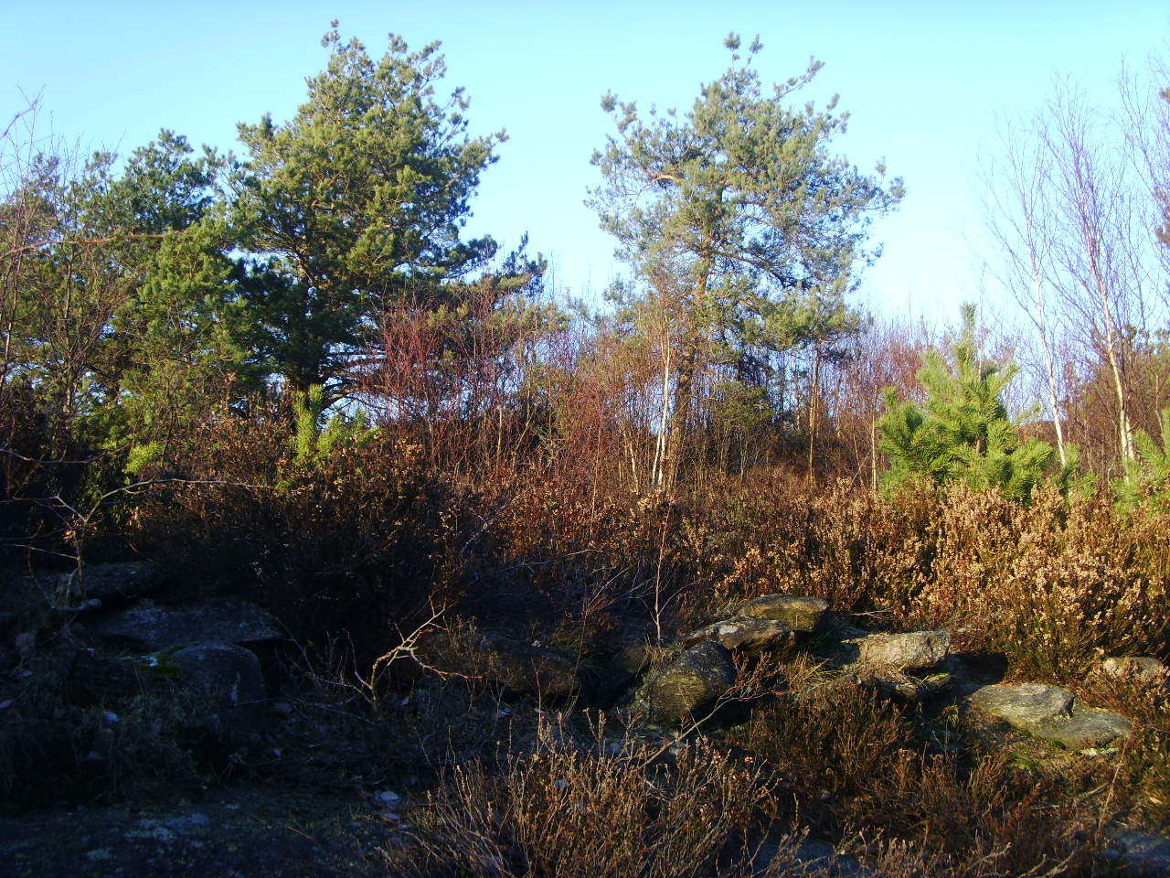 Fornborgen i Biskopsgården på Hisingen har RAÄ-numret Björlanda 193:1.